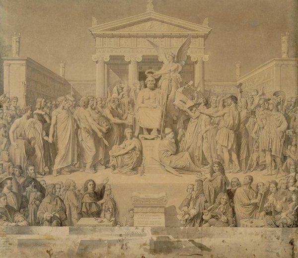 Homero deificado, de Jean-Auguste-Dominique Ingres, 1840-1865, Museo del Louvre, París.